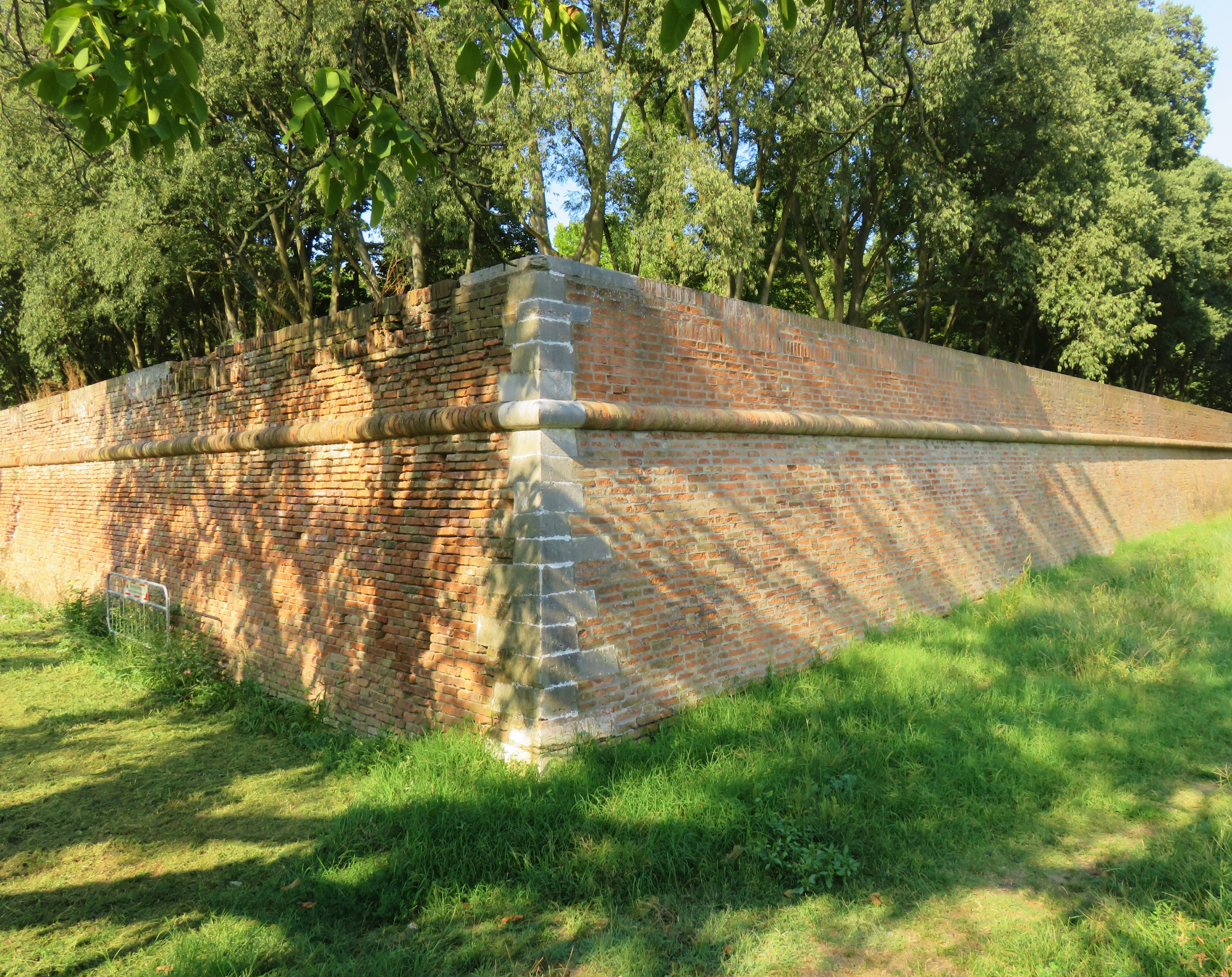 Mura della ex Fortezza Pontificia di Ferrara (nota anche come Cittadella) all'angolo tra via Darsena e via della Fortezza